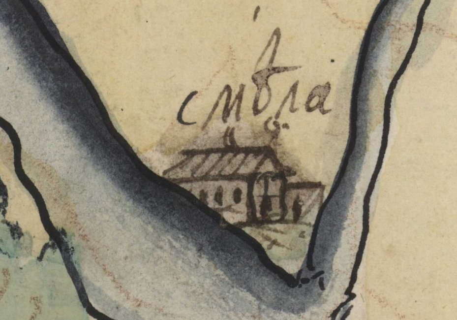 Фрагмент карти Київської губернії. XVIII століття. РГАДА, ф. 192, оп. 1, Киевская губ., № 5.